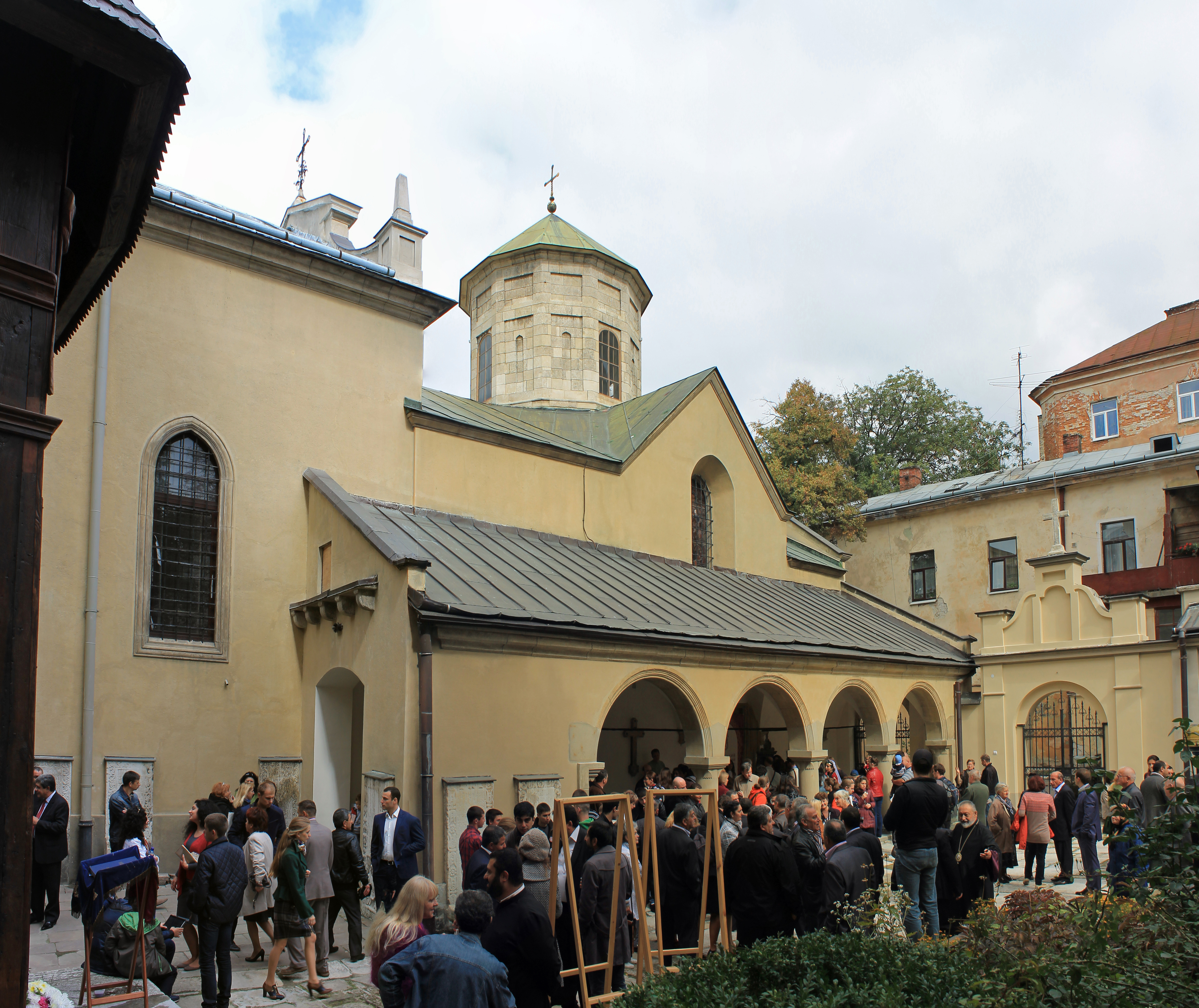 Вірменський собор Св.Трійці у Львові: Святкування 650-річча вулиці Вірменської.